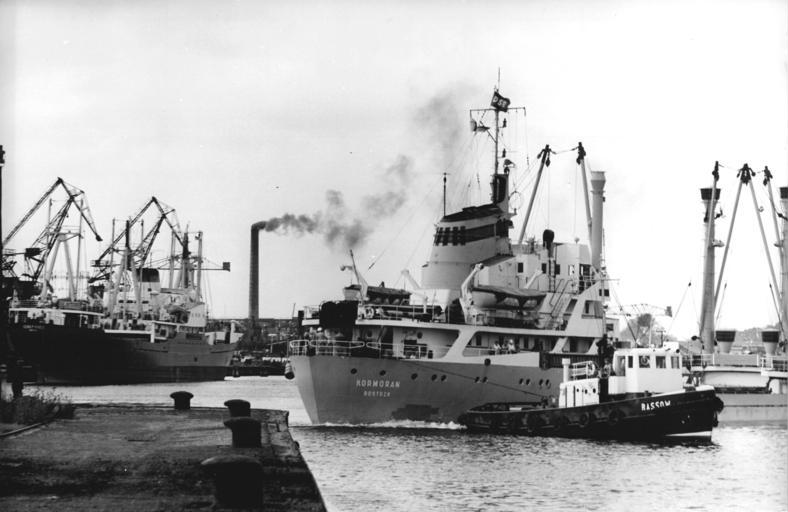 Rostock, Überseehafen, Frachter, Schlepper Zentralbild Spremberg 14.7.1965 Alter Rostocker Hafen. Täglich löschen hier viele ausländische Frachter ihre Ladung. In See sticht der DDR-Frachter "Kormoran" (unser Foto), der aus dem Hafen bugsiert wird.